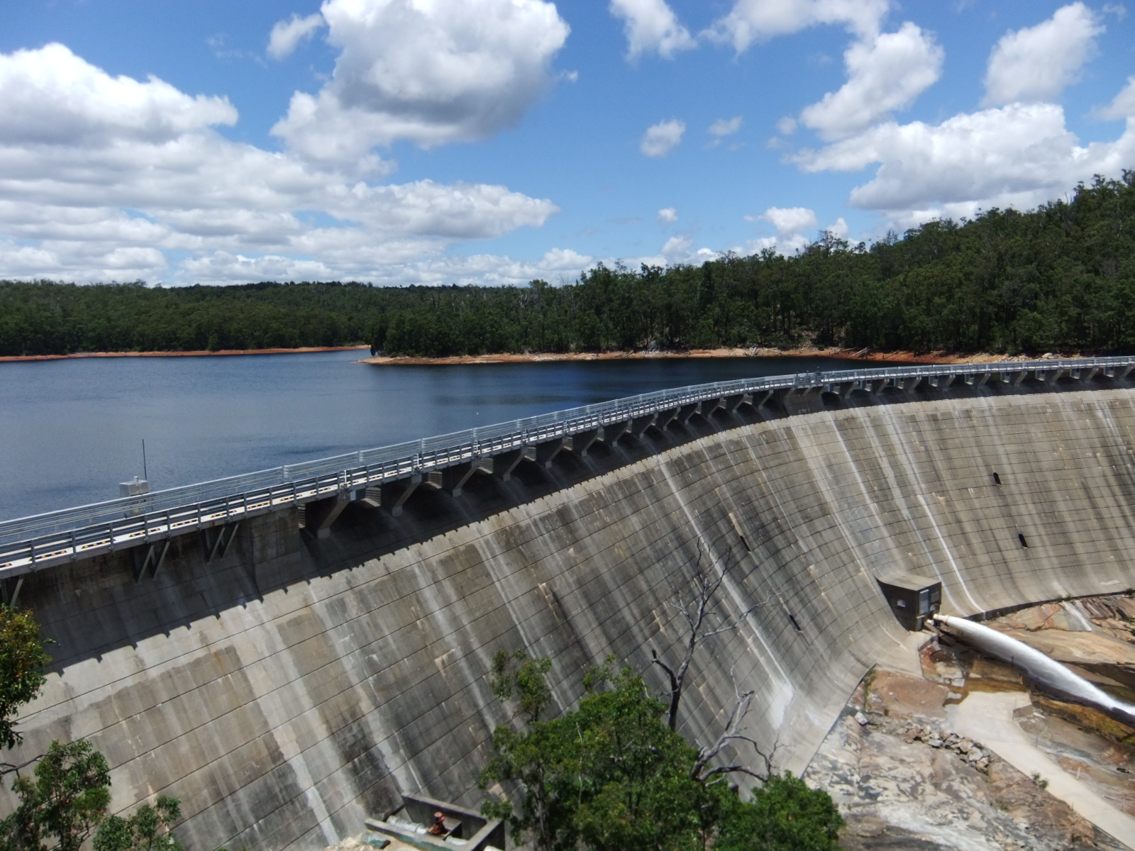 Wellington Dam